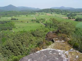 Eine Landschaft im Pfälzerwald. – Blick von der Nonne beim Bärenbrunnerhof. (andere Beschreibung: Blick vom Luger Geierstein Richtung Rehberg, Madenburg, Richtung Osten)